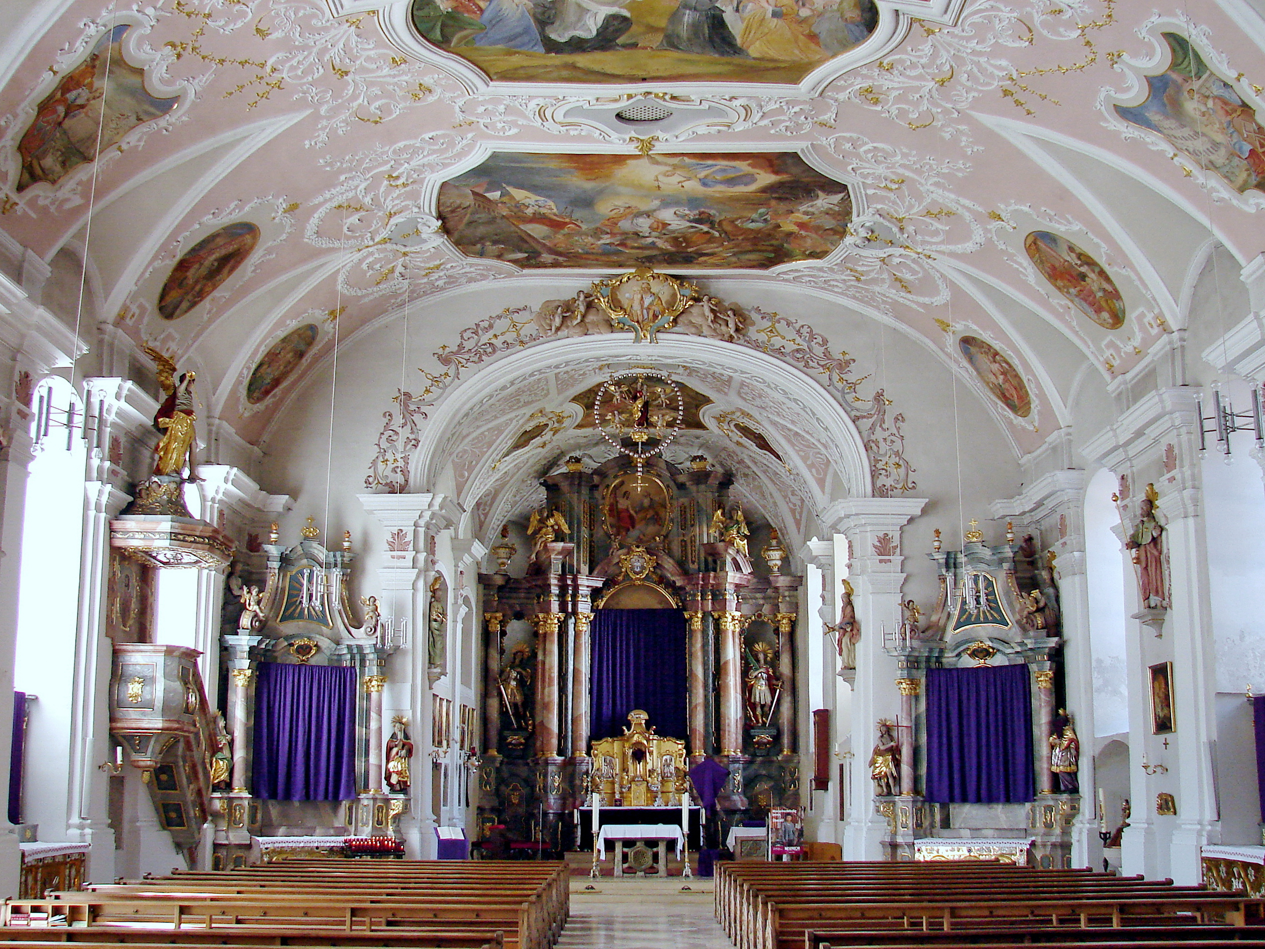 Die katholische Pfarrkirche St. Ulrich in der bayerischen Marktgemeinde Hohenfels ist eine barocke Kirche, die in der heutigen Form zwischen 1716 und 1721 erbaut und dem heiligen Ulrich von Augsburg geweiht wurde. Sie gehört zum Dekanat Laaber im Bistum Regensburg.